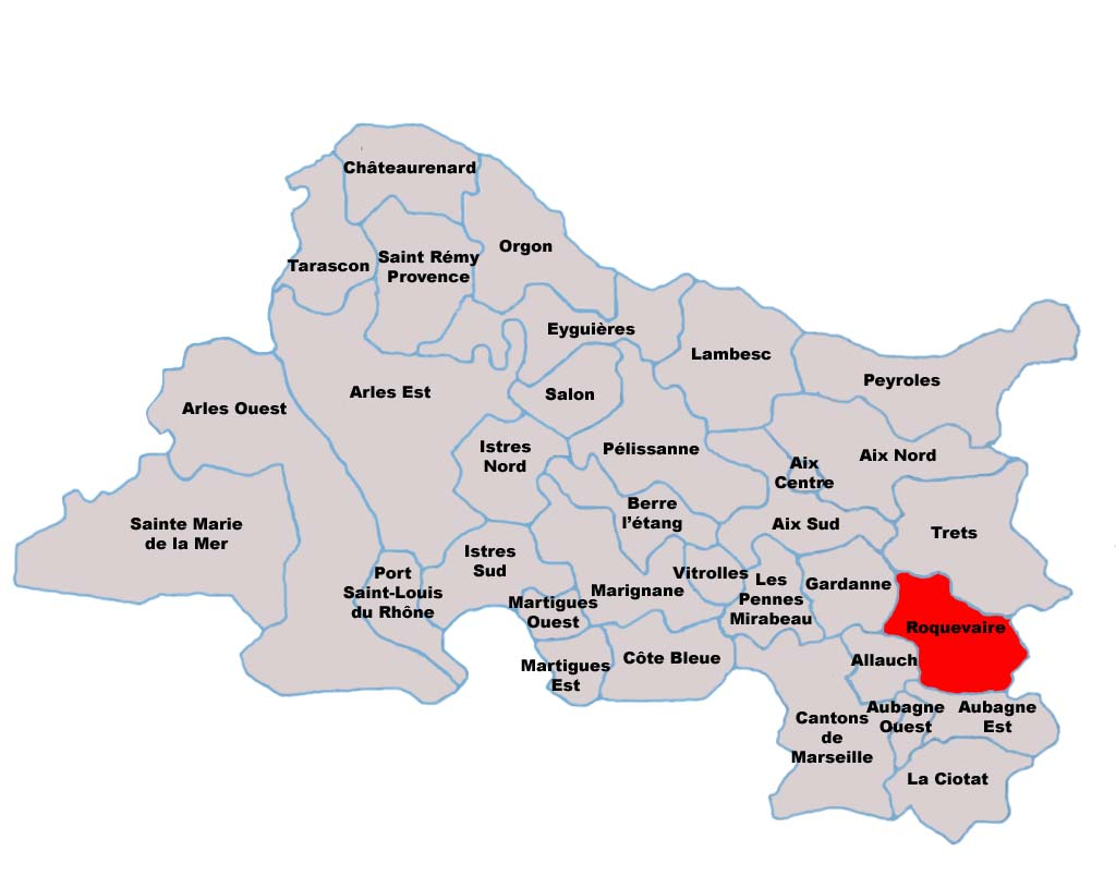 Situation du Canton de Roquevaire dans les Bouches-du-Rhône; Auteur : civodule